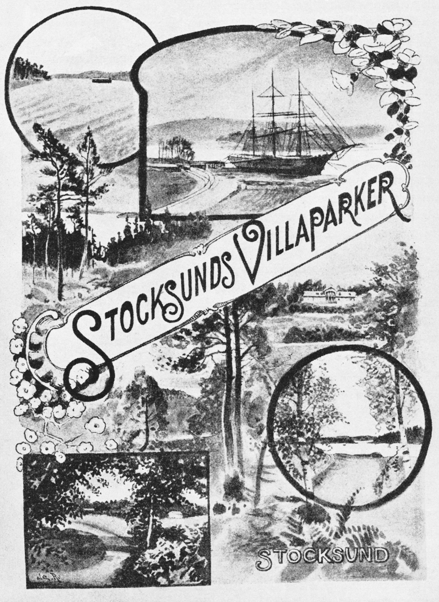 Omslag till reklambroschyren "Stocksunds Villaparker"